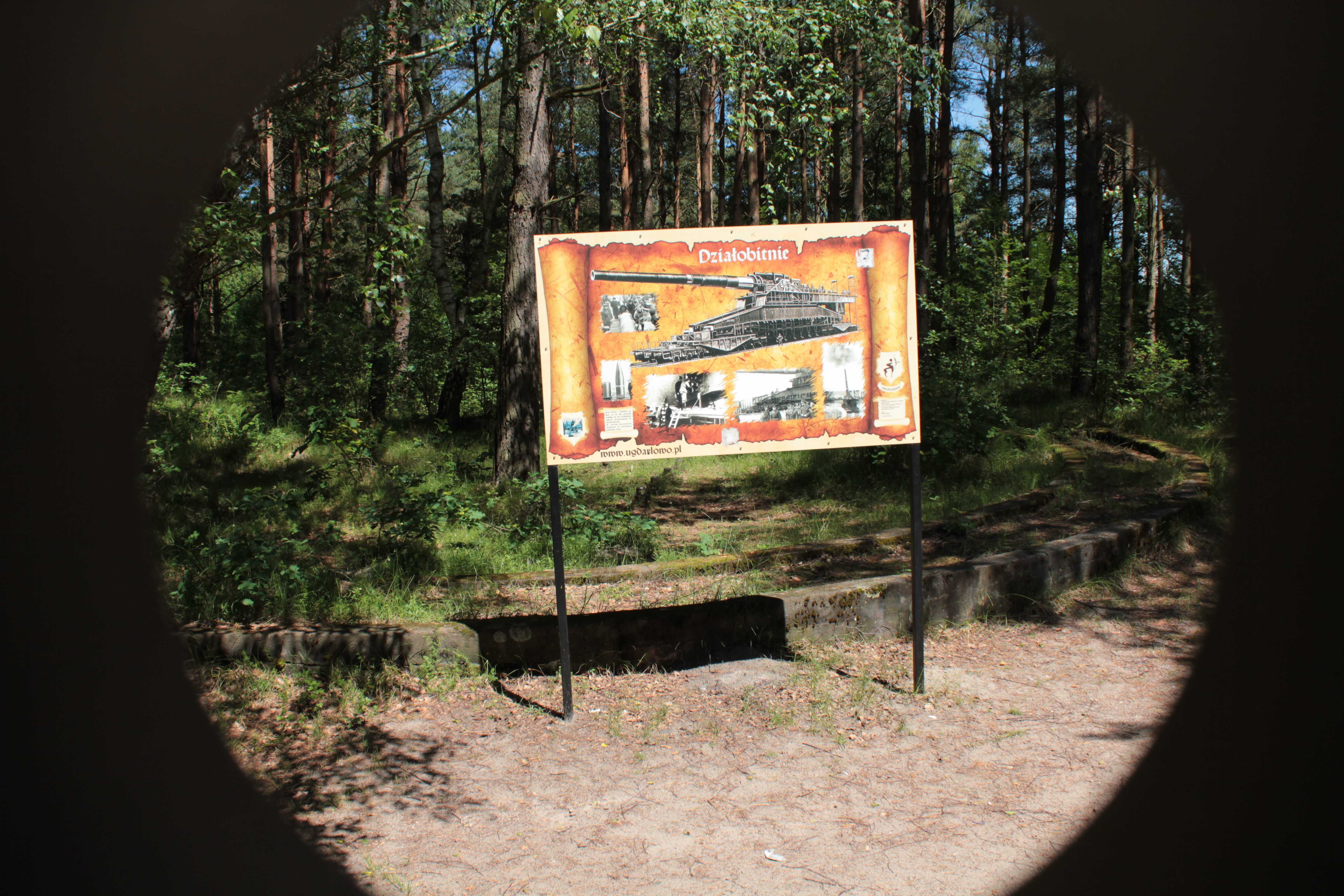 Bobolin - pozostałości działobitni